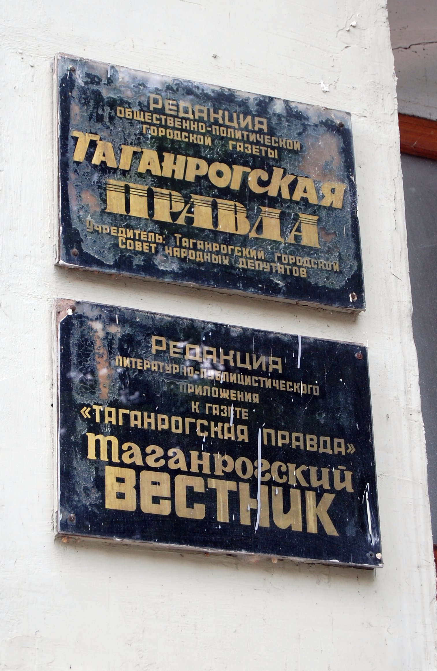 Вывеска на здании редакции газеты "Таганрогская правда"